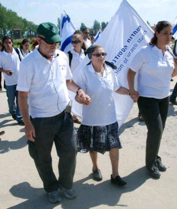 אבי רט, עם שרה טסלר, ניצולת שואה, בכניסה למחנה בירקנאו, עם משלחת התאחדות הסטודנטים